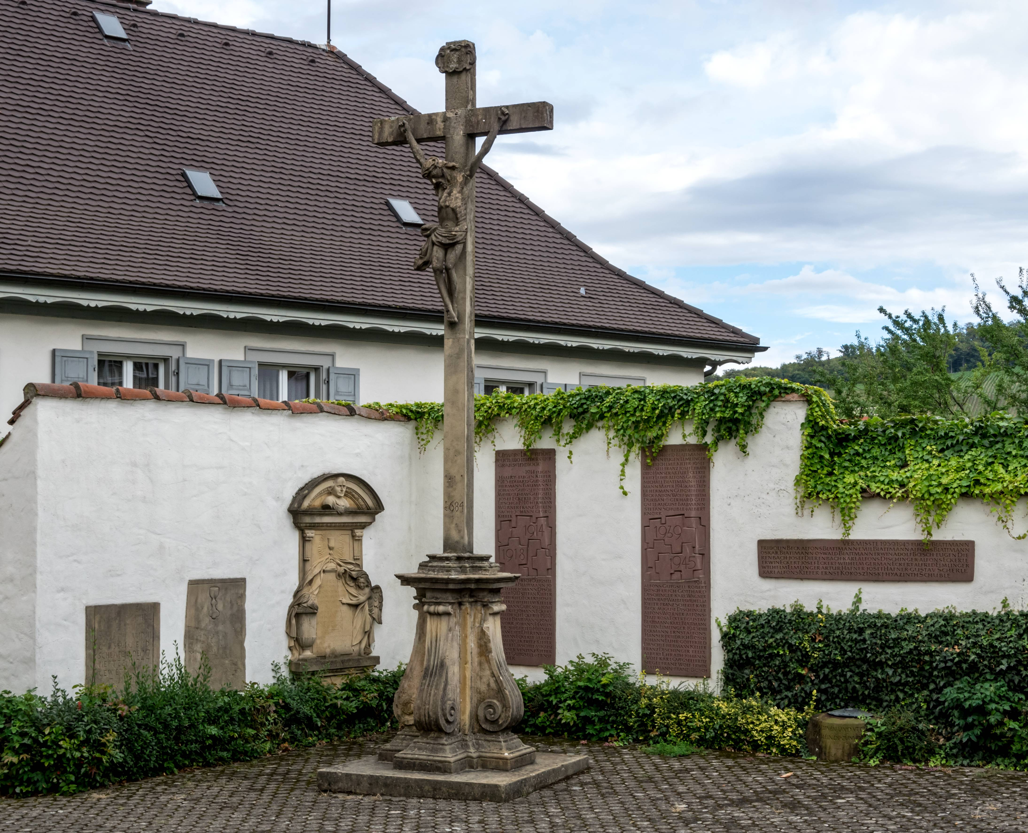 Bilder von St. Columba. in Pfaffenweiler